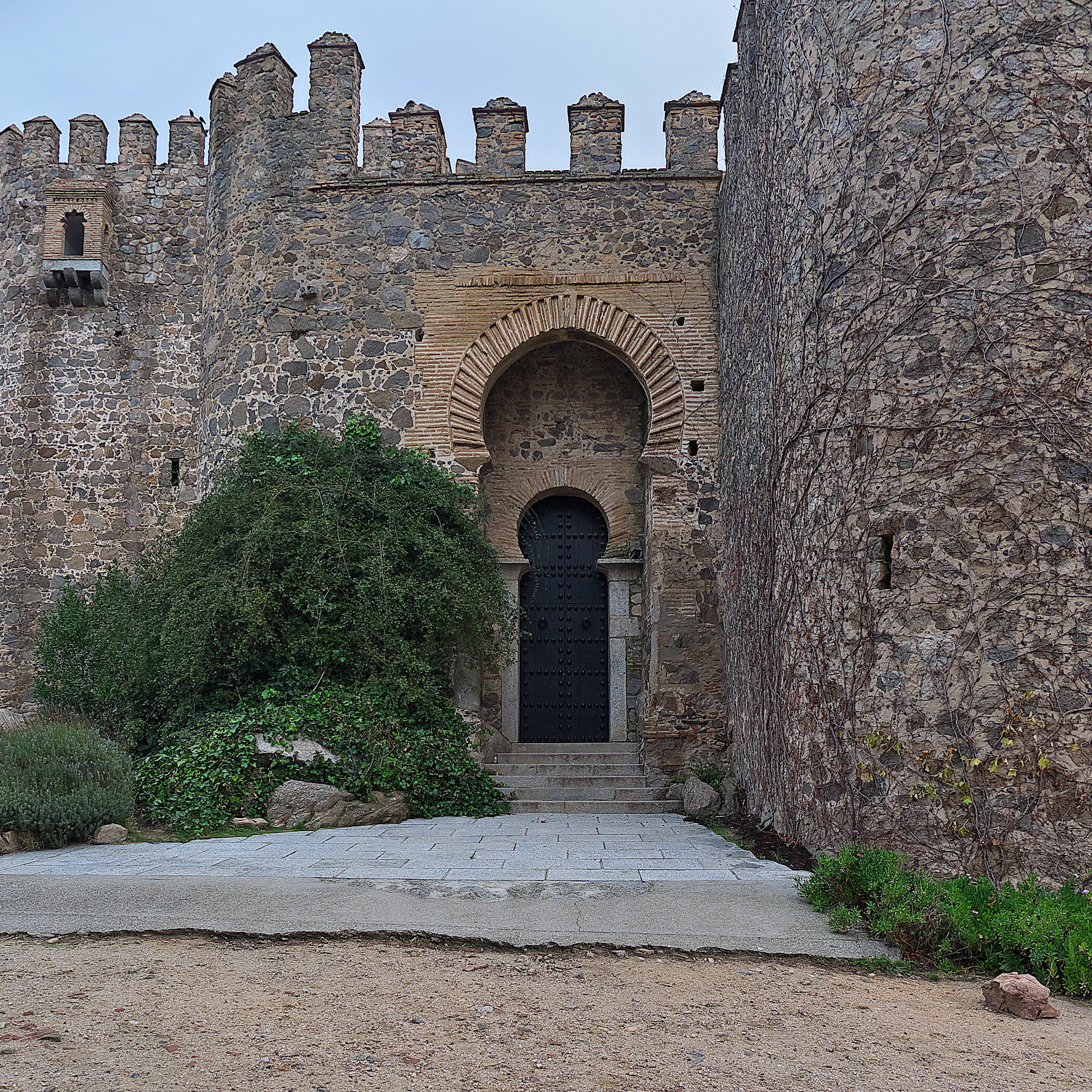 Alfonso VI patrocinó en estos lugares un monasterio para los monjes de Cluny, el Monasterio de San Servando.